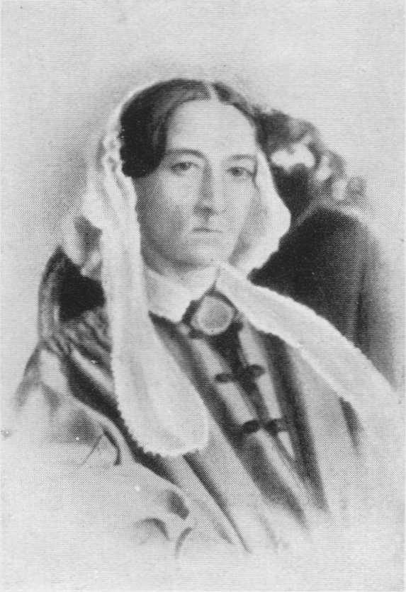 Therese Staufenau geb. Gauß als verheiratete Frau, Foto, ab 1856.